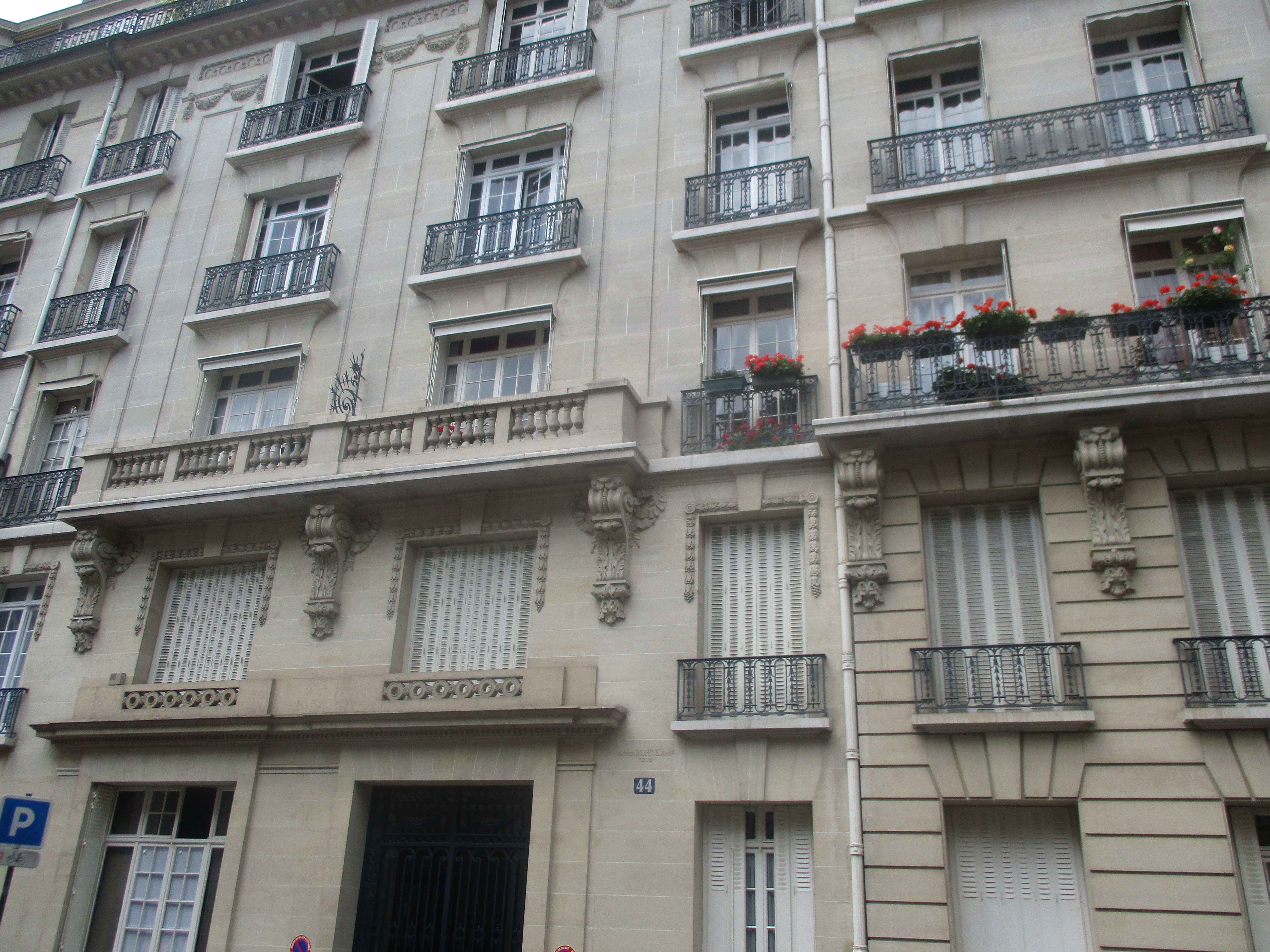 44 rue de la Faisanderie (Paris XVIe) qui abrita une partie de l'état-major du Befehlshaber der Ordnungspolizei pendant l'Occupation allemande.